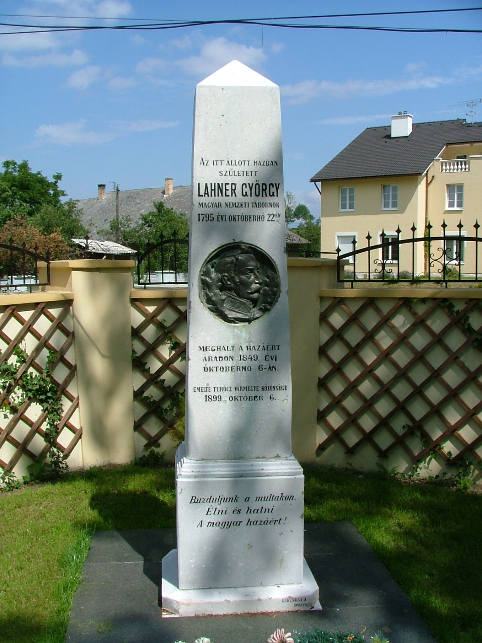 Lahner György emlékoszlopa szülőfalujáan, Necpálon (Turóc vármegye)